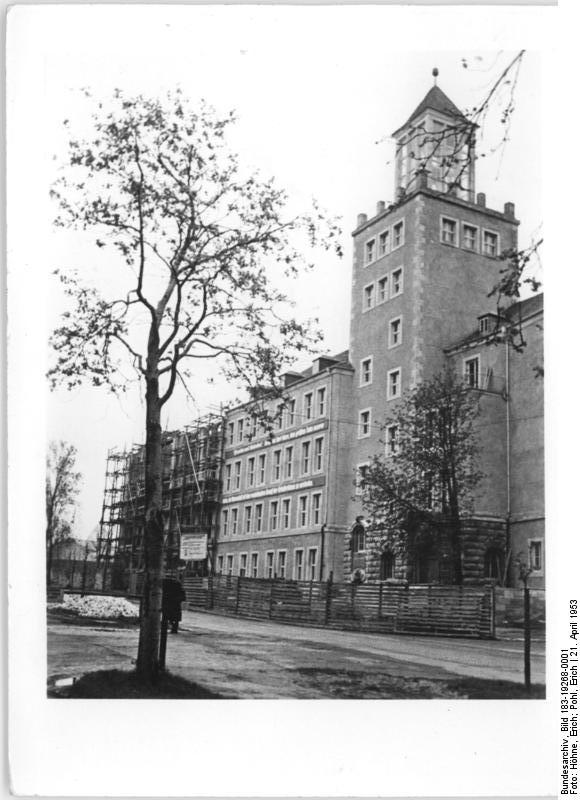 Dresden, Neues Lehrgebäude der Arbeiter - und Bauernfakultät Zentralbild Höhne-Pohl 21.4.1953 Dresden wird schöner denn je Dresden kommt als Hochschulstadt besondere Bedeutung zu. Immer mehr Söhne und Töchter unserer Werktätigen werden als Arbeiter- und Bauernstudenten ihr Studium aufnehmen. Um die dazu nötigen Voraussetzungen zu schaffen, entsteht am Zellschen Weg in Dresden ein neues Lehrgebäude der Arbeiter- und Bauernfakultät.